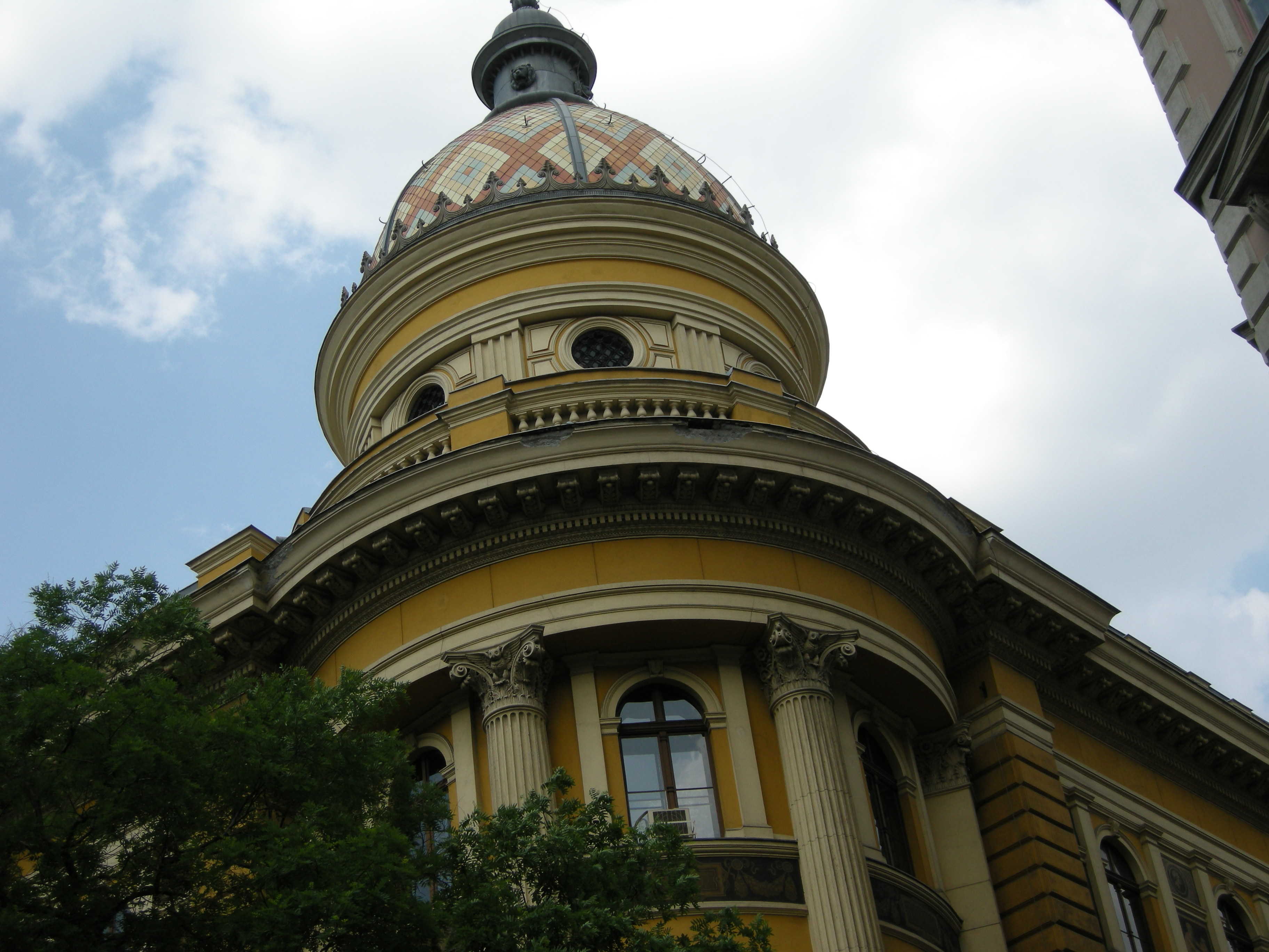 Budapest